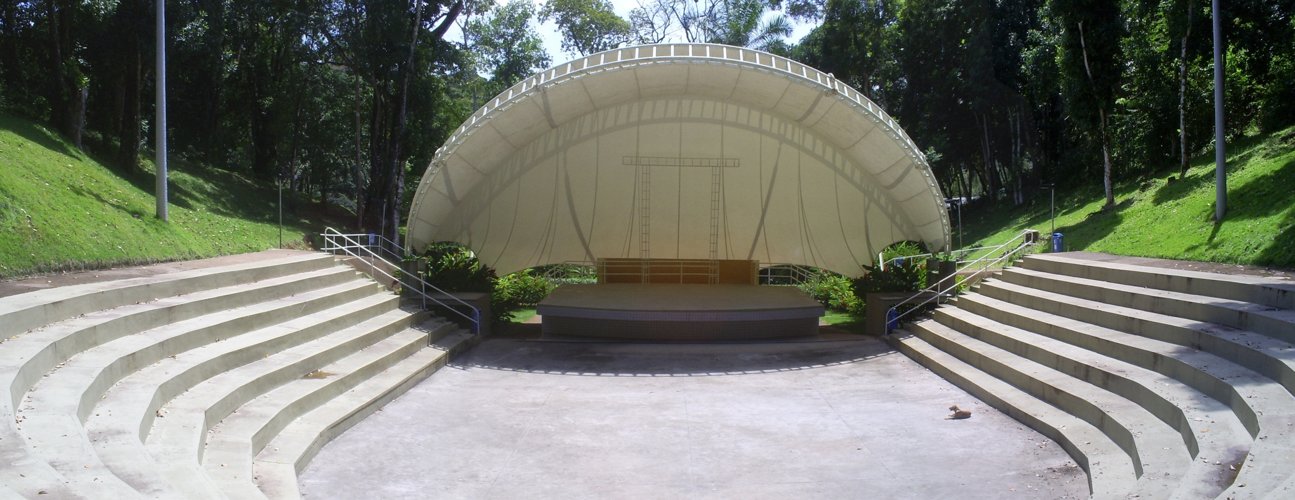 Anfiteatro do Parque da Cidade, Salvador, Bahia, Brasil.